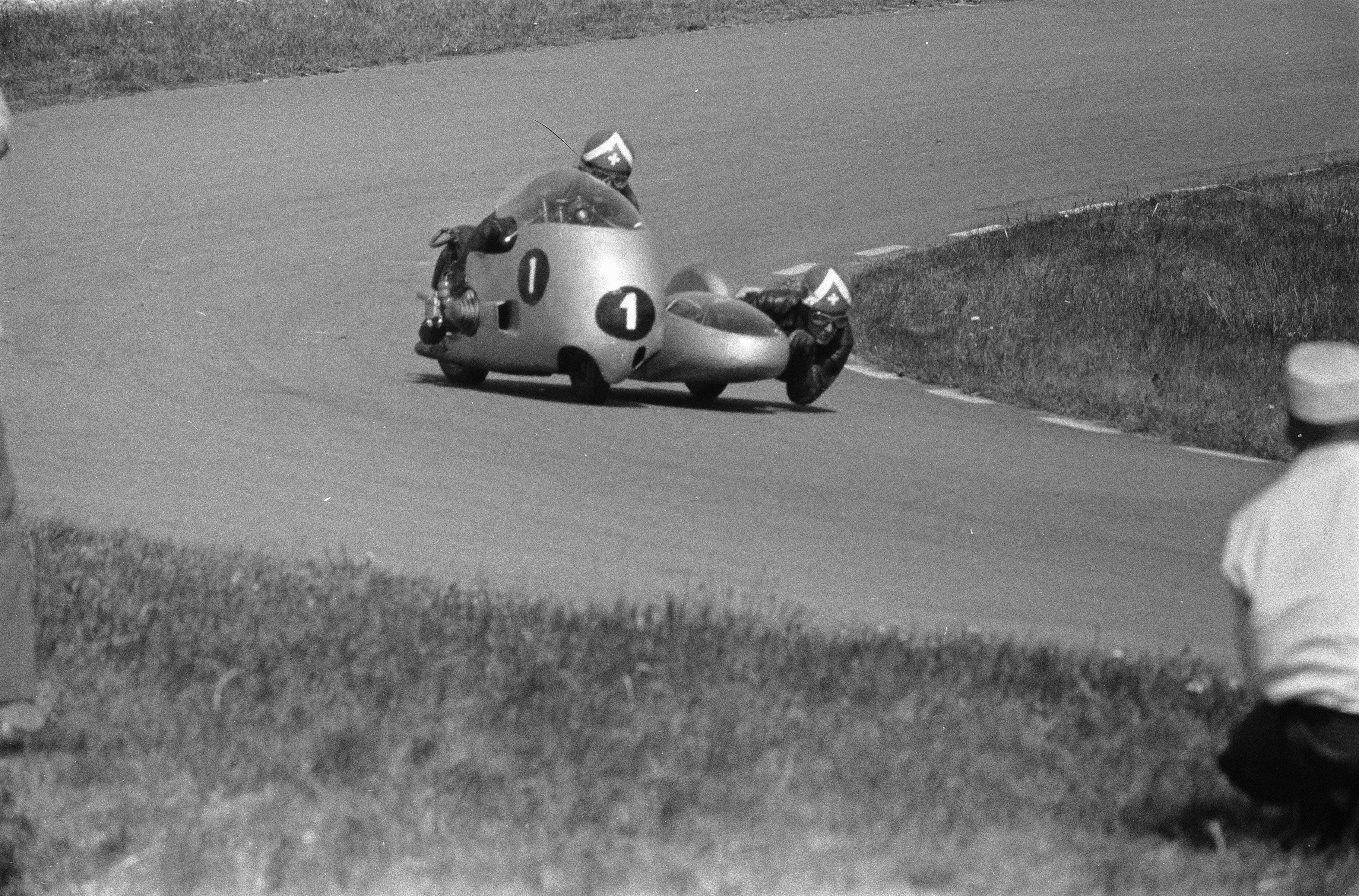 Collectie / Archief : Fotocollectie Anefo Reportage / Serie : TT Assen 1960 Beschrijving : Zijspanrace. (nr. 1 Camathias/Föll) Annotatie : Kregen later pech en finishten niet Datum : 26 juni 1960 Locatie : Assen Trefwoorden : motorsport Instellingsnaam : TT Fotograaf : Bilsen, Joop van / Anefo Auteursrechthebbende : Nationaal Archief Materiaalsoort : Negatief (zwart/wit) Nummer archiefinventaris : bekijk toegang 2.24.01.05 Bestanddeelnummer : 911-3668